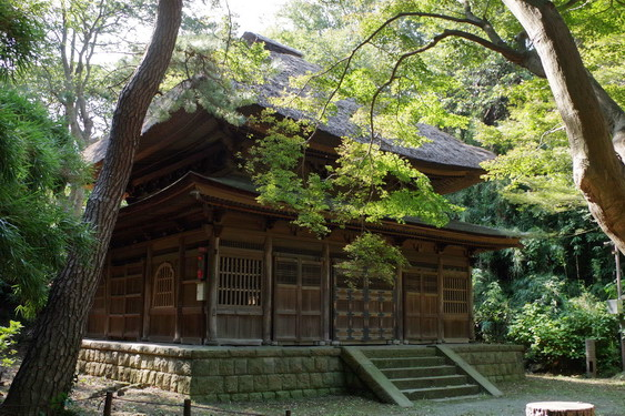 三溪園に移築された東慶寺旧仏殿。